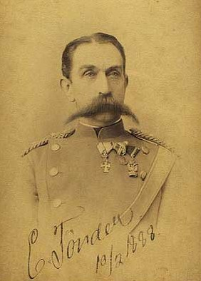 Ebbe Holger Valdemar Tønder (1836-1921), Danish army officer